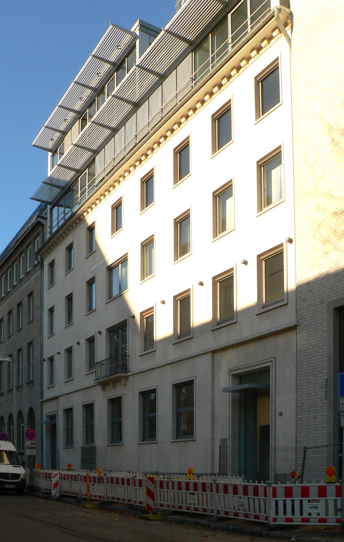 Sitz der Niedersächsische Landeszentrale für politische Bildung